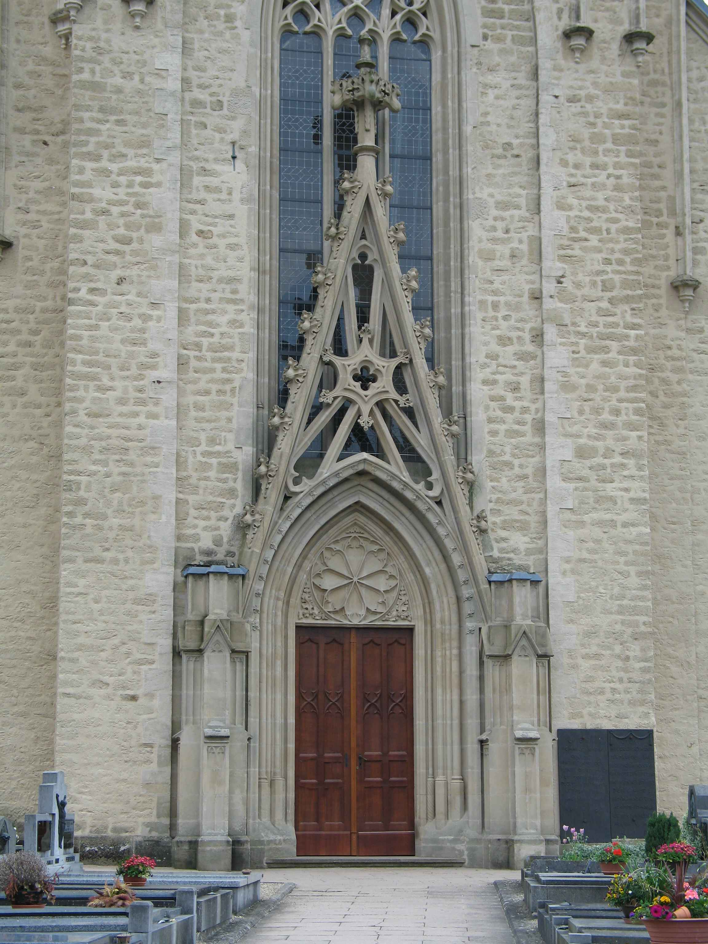 Entree vun der Kierch zu Fëschbech.